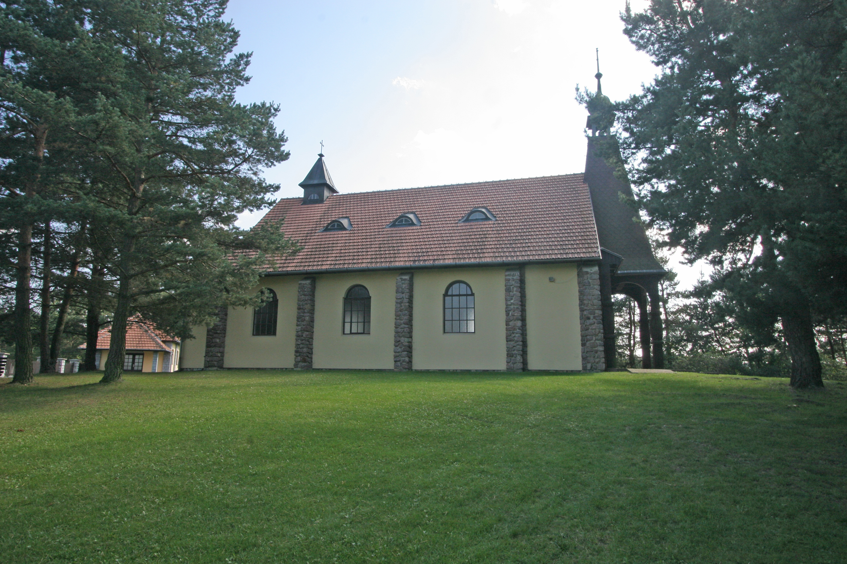 Oslnovice kaple Nejsvětějšího Srdce Ježíšova